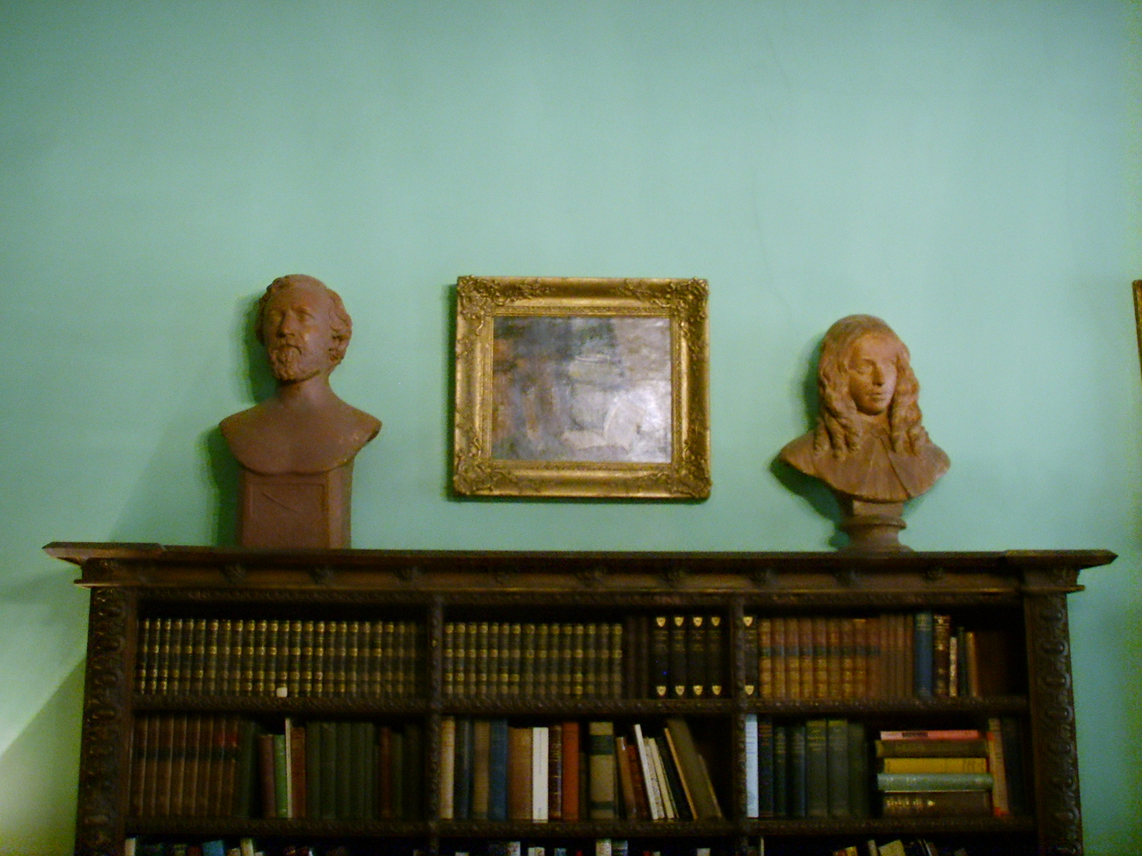 Casa Guidi, soggiorno 04 busti elizabeth e robert